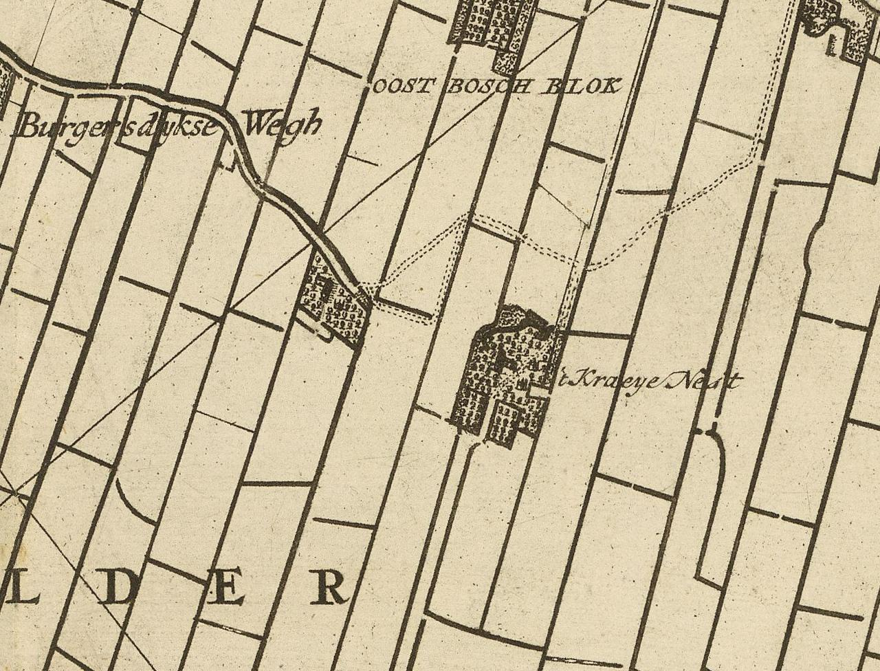 Kaart van het hoogheemraadschap van Delfland, gemeten door de landmeters Nicolaas en Joacobus Kruchius. Uitgezoomd op de boerderij welke al als 't Kraeyenest bekend staat nabij De Lier.